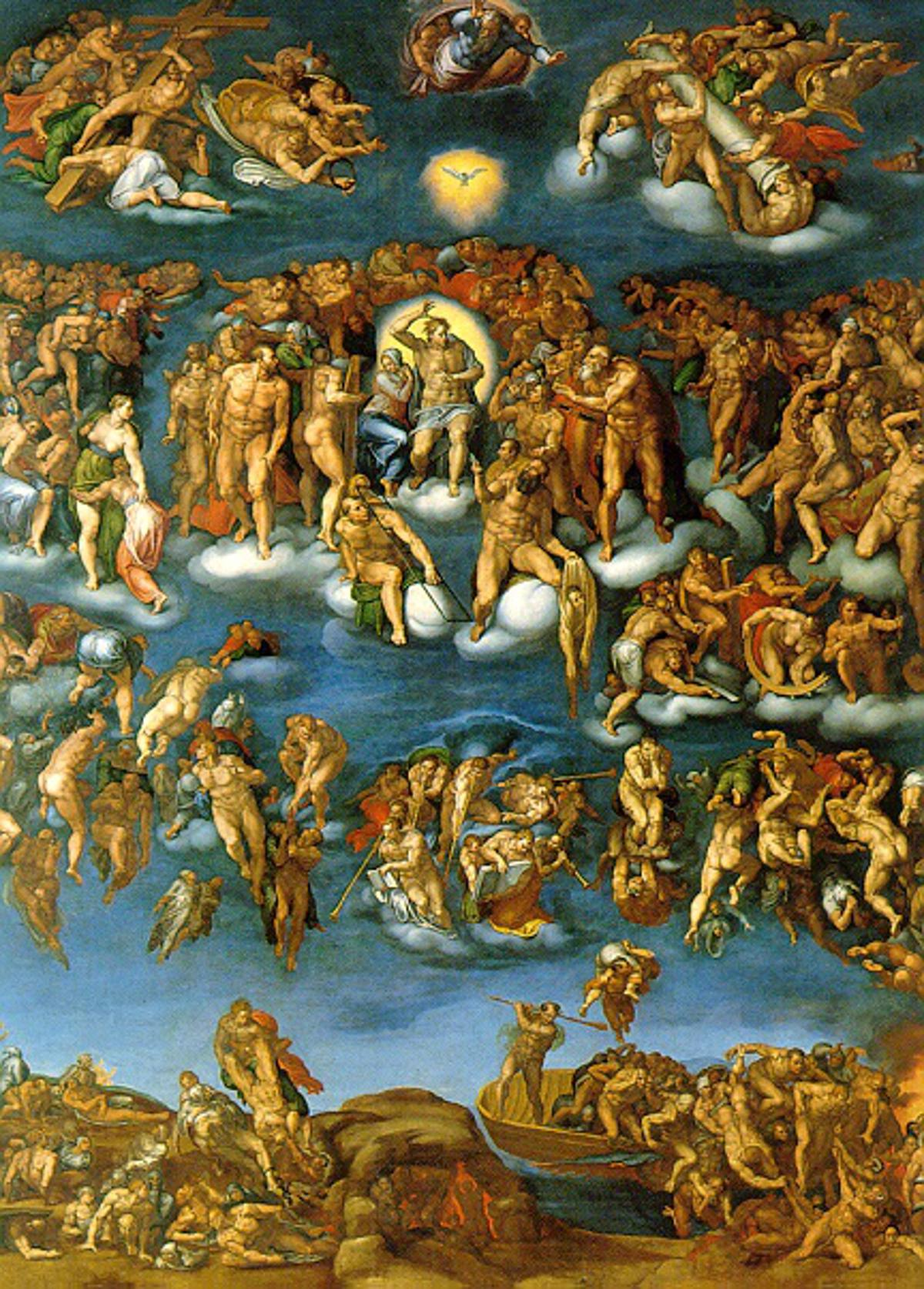 Il Giudizio Universale di Marcello Venusti è un quadro (tempera grassa su tavola, cm 188.5 x 145) che si trova a Napoli nel Museo di Capodimonte (inv. Q 139), facente parte della Collezione Farnese. Il dipinto è una delle più importanti copie del celebre affresco di Michelangelo nella Cappella Sistina, in quanto che, essendo stato commissionato dal cardinale Alessandro Farnese nel 1549, rappresenta un documento eccezionale di come l'affresco appariva prima che il Concilio di Trento imponesse la copertura delle parti considerate indecenti.